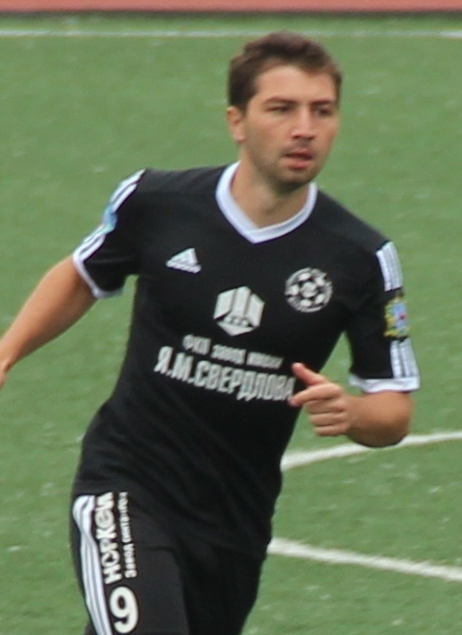 Ruslan Pashtov